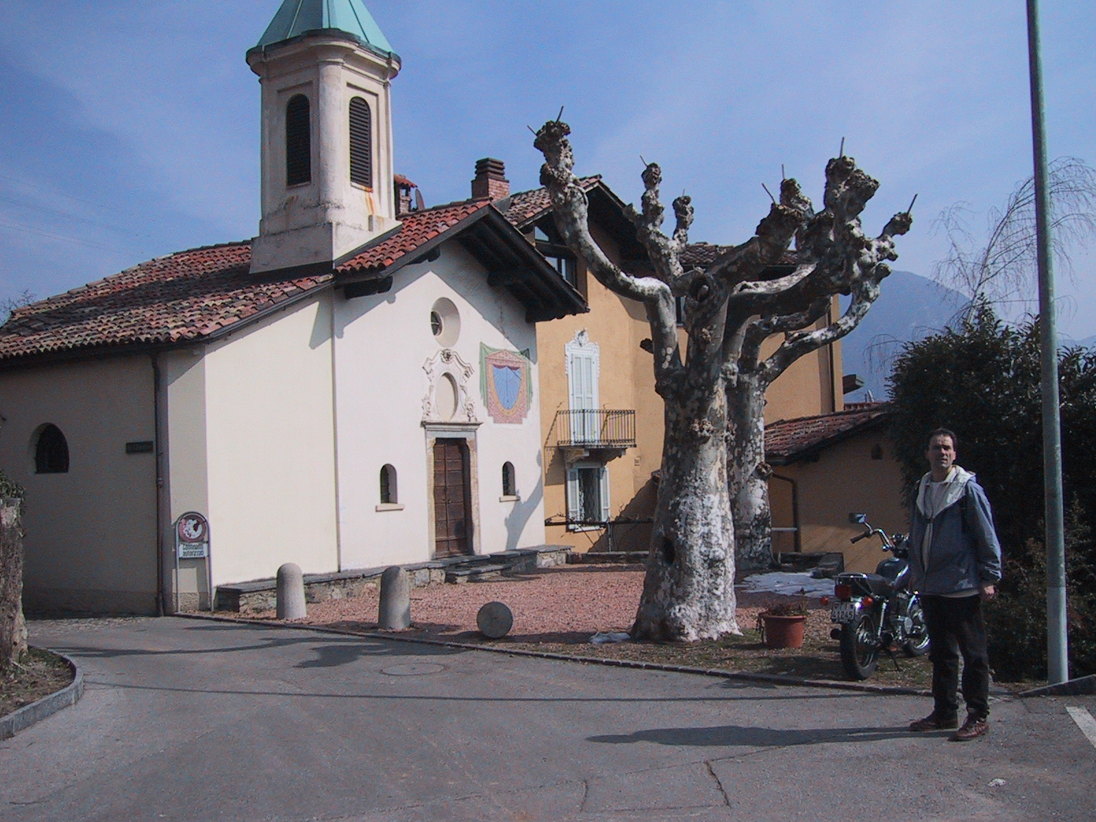 Oratorio di Santa Maria delle Grazie a Ciona, frazione di Carona